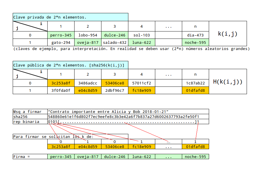 Representacion de secuencia para firmar un documento con una firma de Lamport. La clave privada utiliza algunas palabras comunes para facilitar la visualización del proceso. En un uso real se deben utilizar valores criptograficamente seguros.